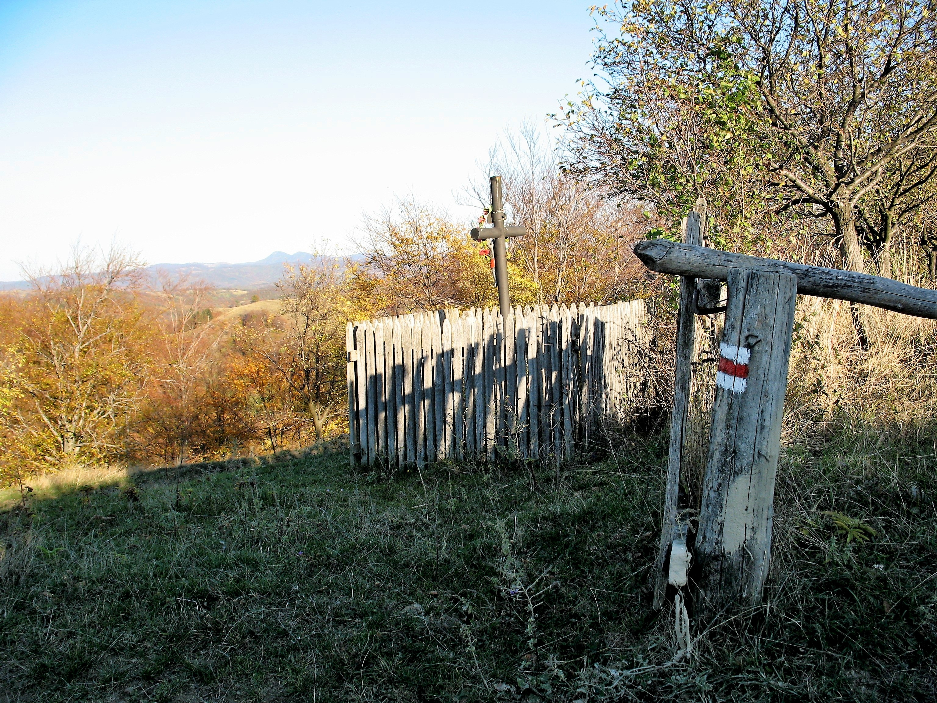 Česká pásová turistická značka na trase z Rovenska do Gerniku